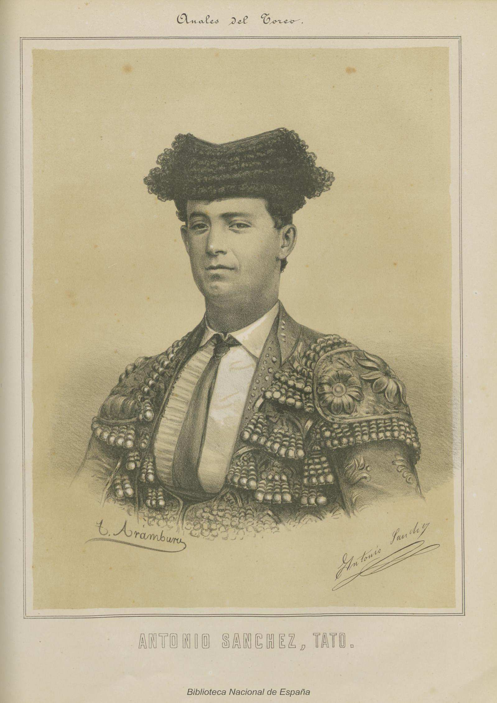 Antonio Sánchez, Tato, litografía de F. Arámburu. ilustración de Anales del toreo : reseña histórica de la lidia de reses bravas : galería biográfica de los principales lidiadores: razón de las primeras ganaderías españolas, sus condiciones y divisas obra escrita por José Velázquez y Sánchez; e ilustrada por reputados artistas, Madrid, 1888.